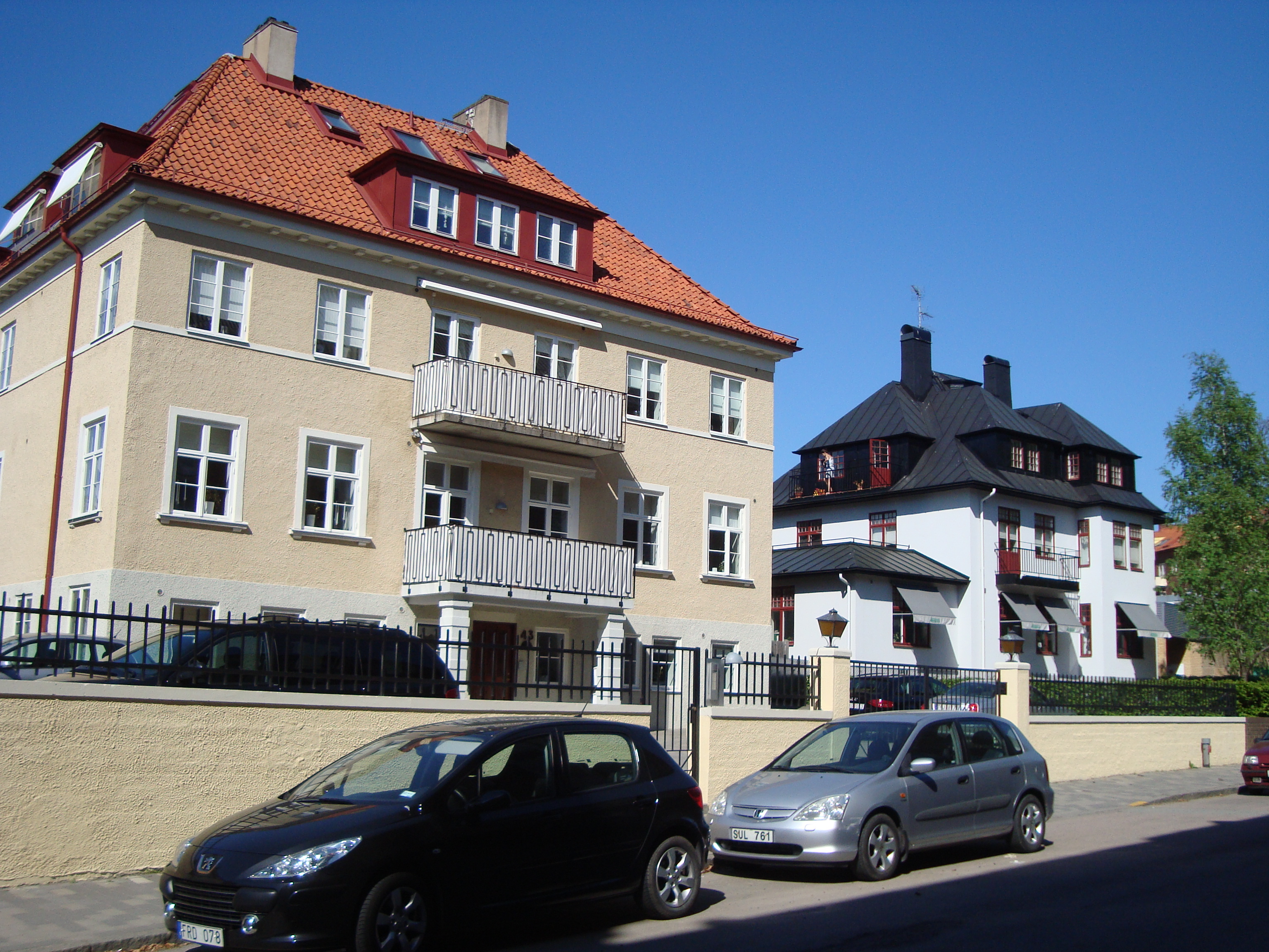 Flerbostadsvillor på Slottshöjden i Helsingborg.